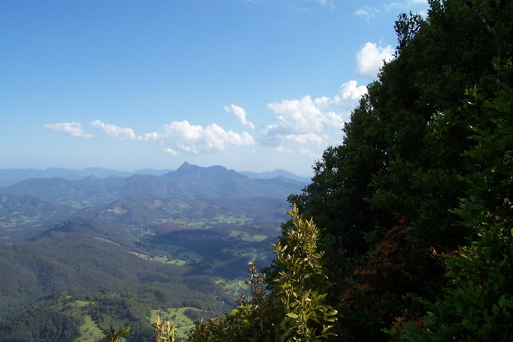 Le Mont Warning en Nouvelle-Galles du Sud en Australie